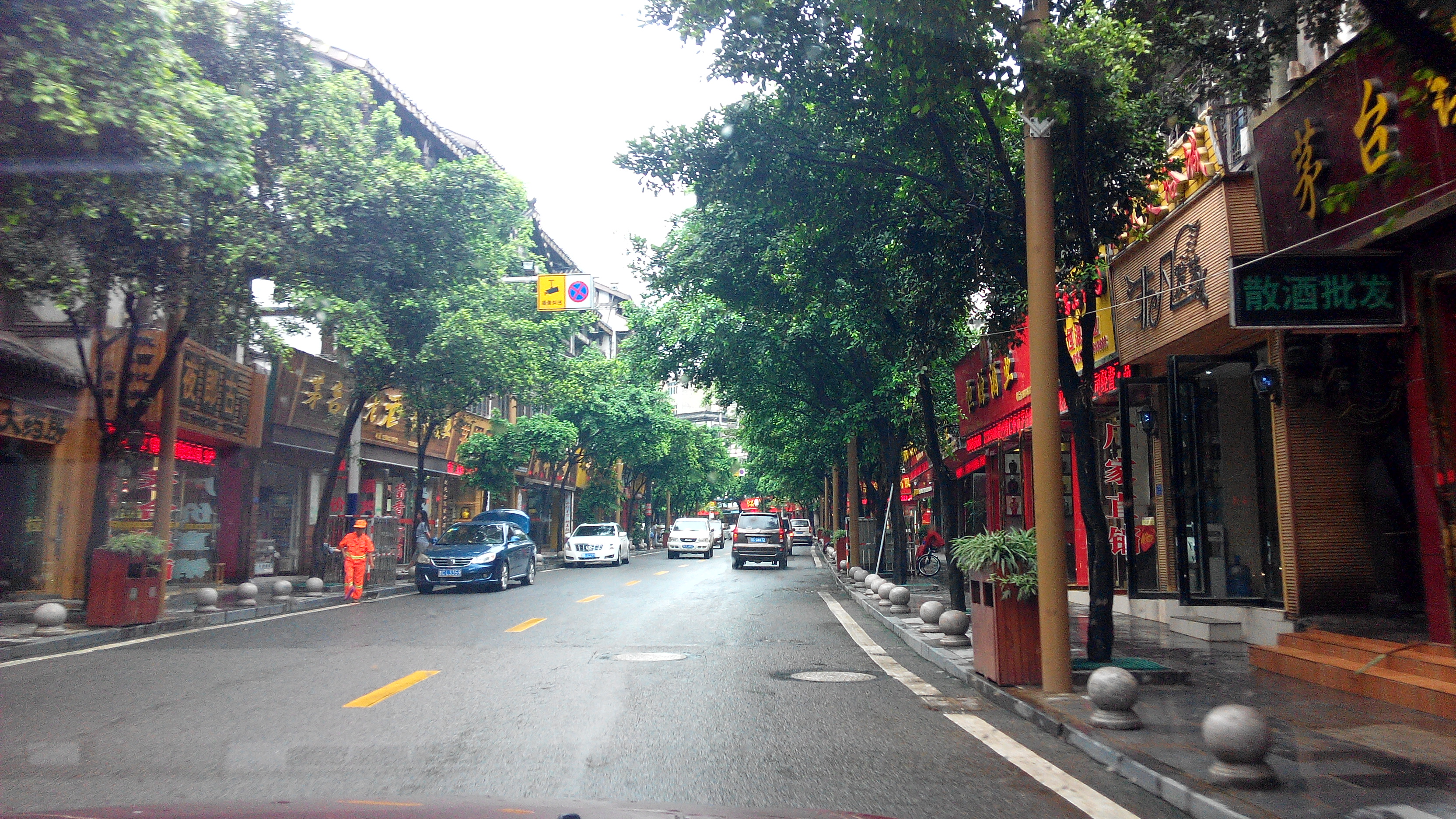 贵州省遵义市仁怀市茅台镇街头